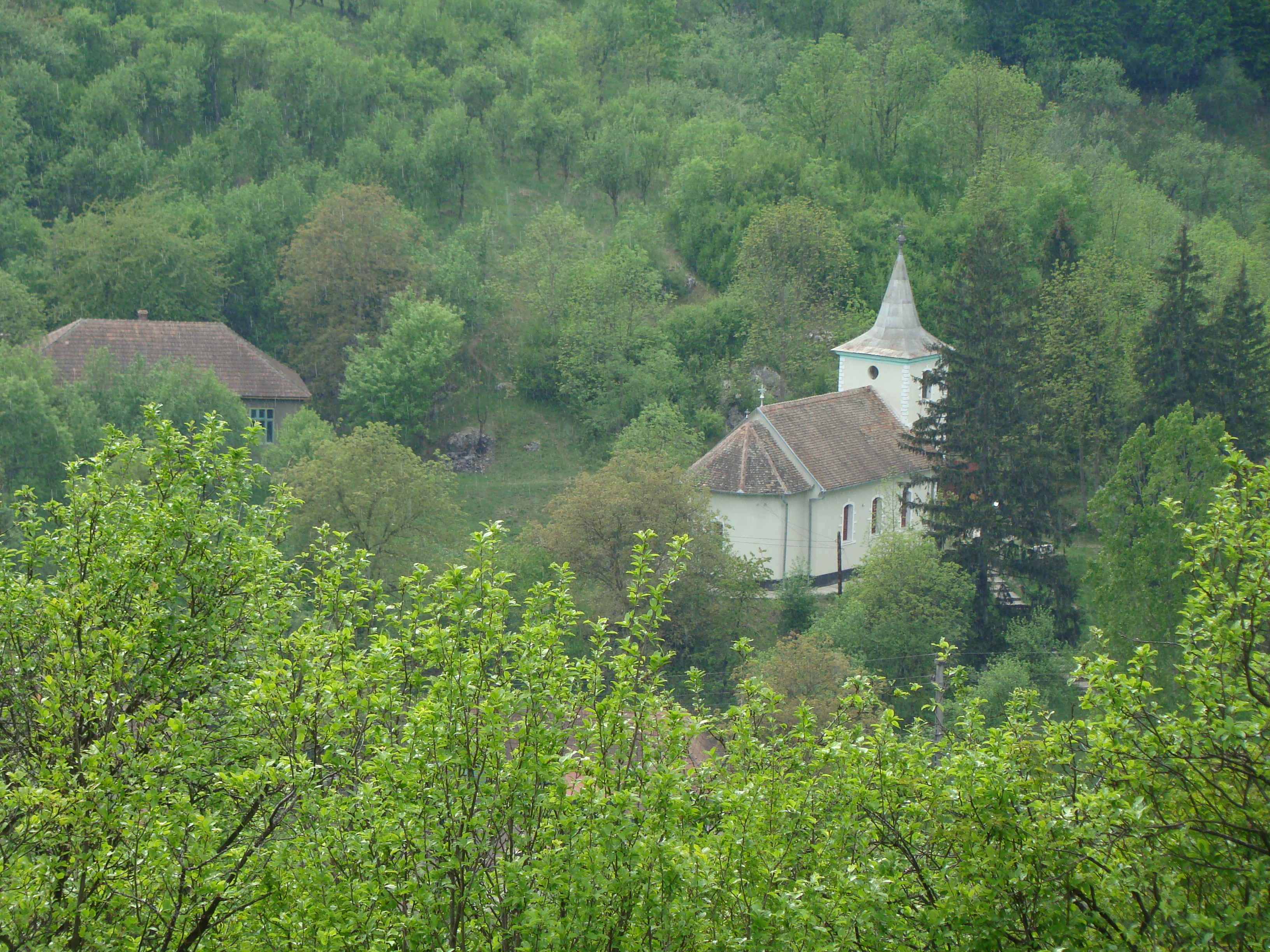 Geoagiu de Sus, Alba